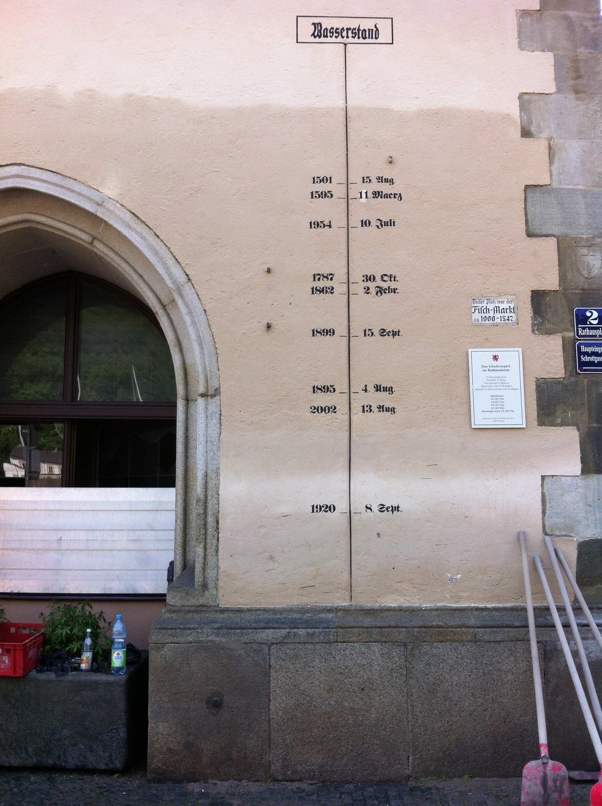 Pegel am Passauer Rathaus nach dem Hochwasser im Jahr 2013 vor Anbringung der Hochwassermarkierung.